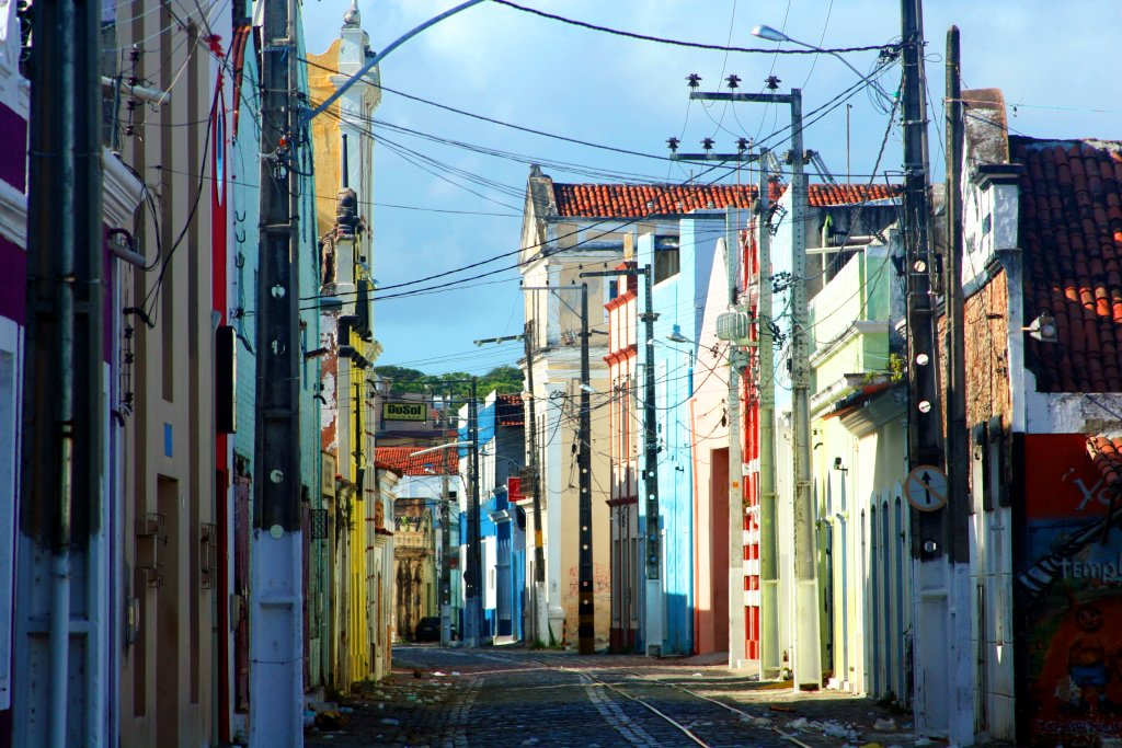 Rua Chile, no bairro do Ribeira, Natal/RN, Brasil.